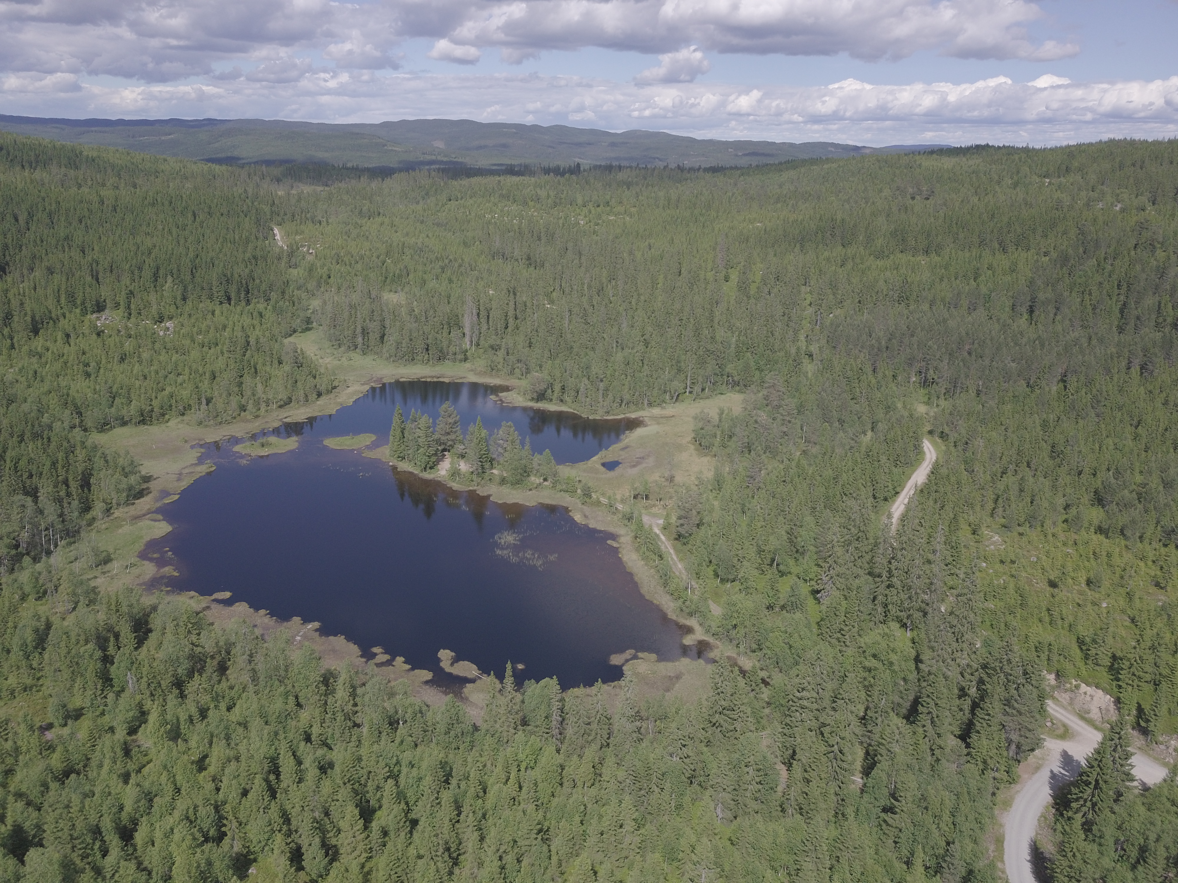 Tangetjernet i Romeriksåsen